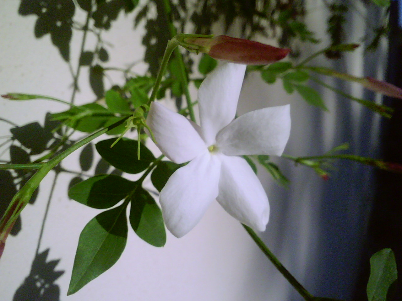 MEZZINA MICHELE FIORE DEL GELSOMINO LUGLIO 2007 MARINA DI MARZA (RAGUSA) AUTORE MEZZINA MICHELE